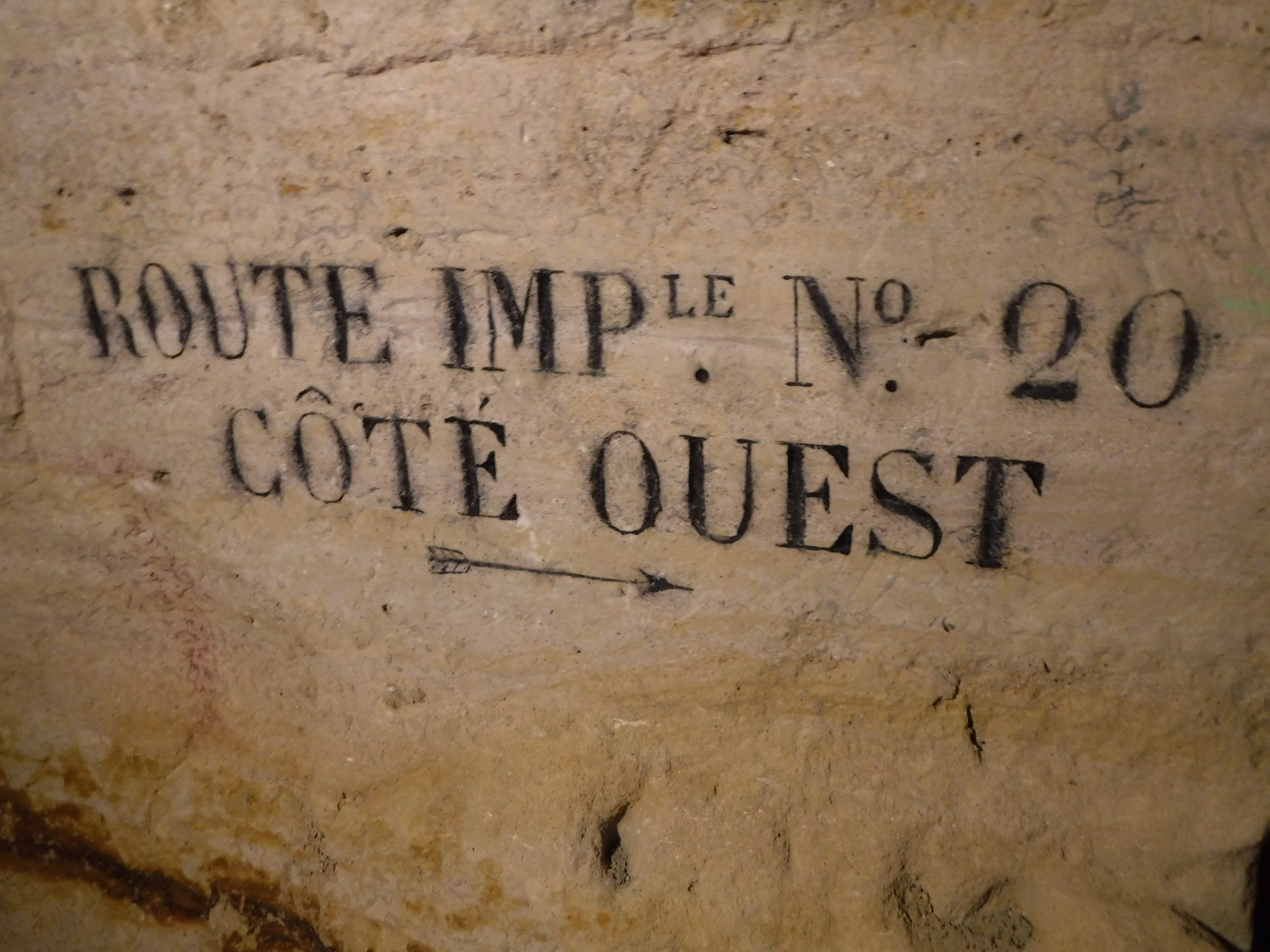 Gravure dans une carrière souterraine au nord de Montrouge, le long de l'aqueduc du Loing, sous la route impériale 20